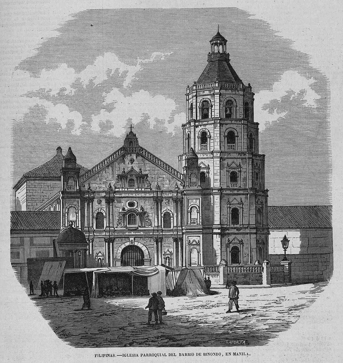 Iglesia parroquial del barrio de Binondo, Manila, en la revista española El Museo Universal.